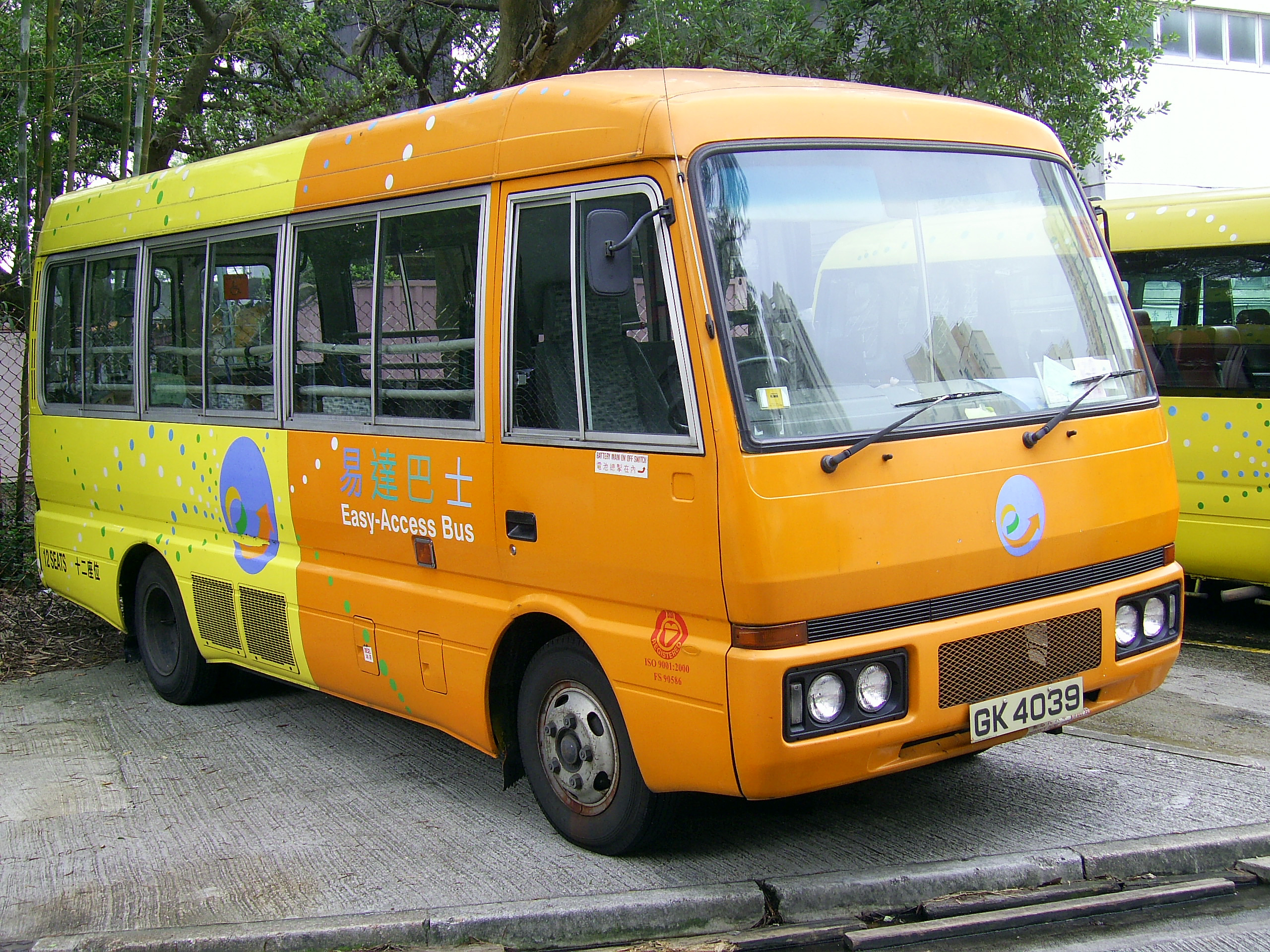 中文（香港）: 易達巴士